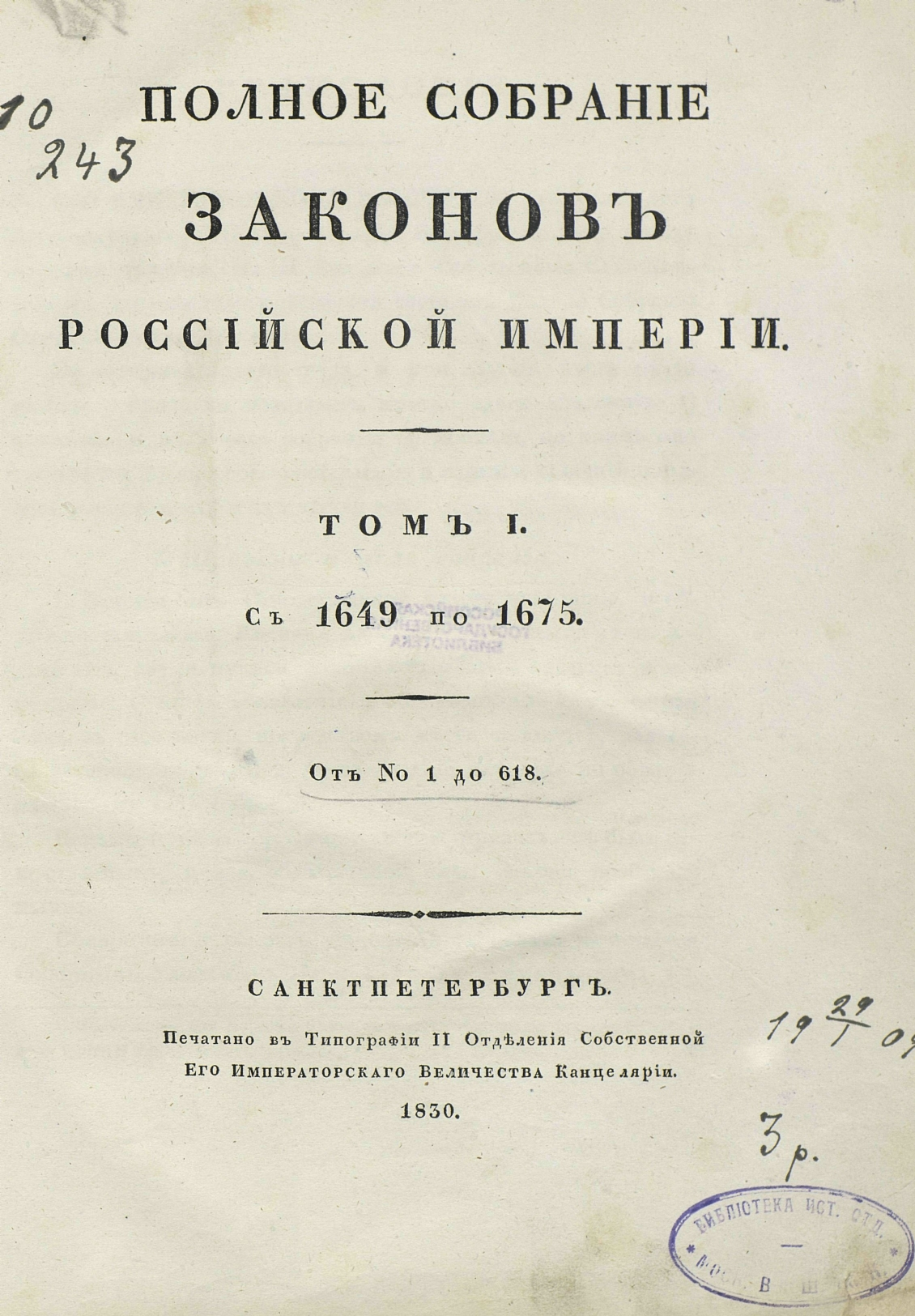 Полное собрание законов Российской империи, том 1